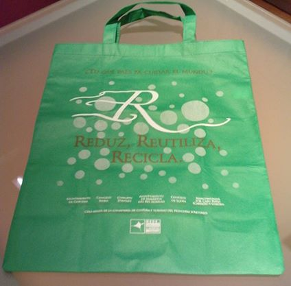 Bolsa de la campaña "Reduz, reutiliza, recicla"